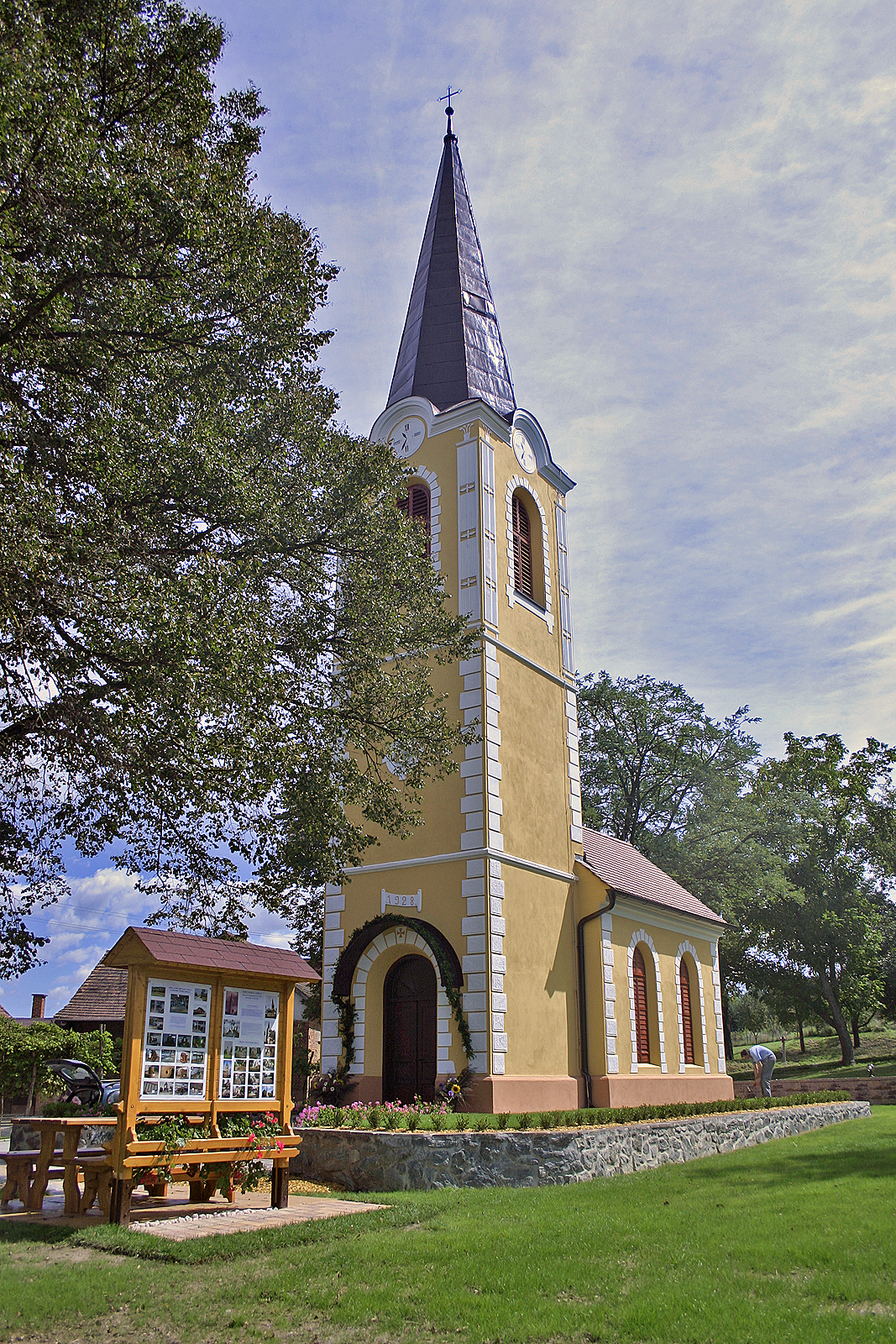 Kapela, Adrijanci. Chapel, Adrijanci. Kapelle, Adrijanci.